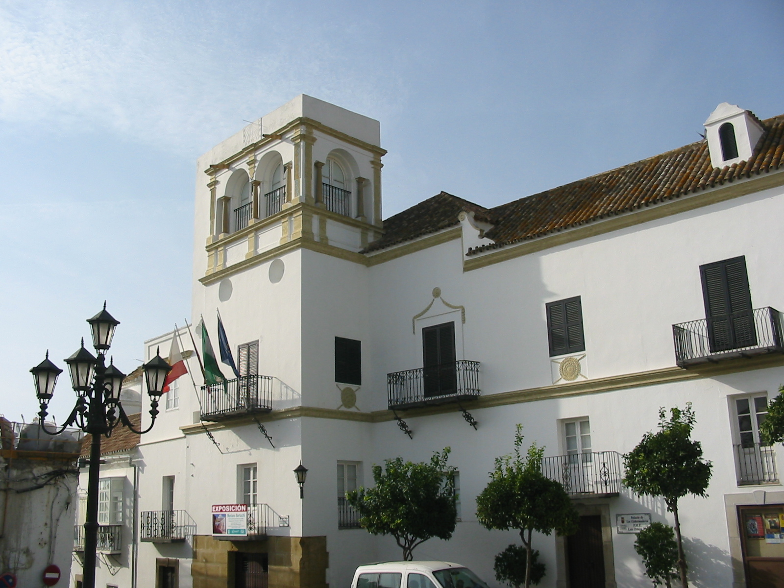 Palacio de los Gobernadores (Governor's Palace), San Roque, Cádiz, Andalusia